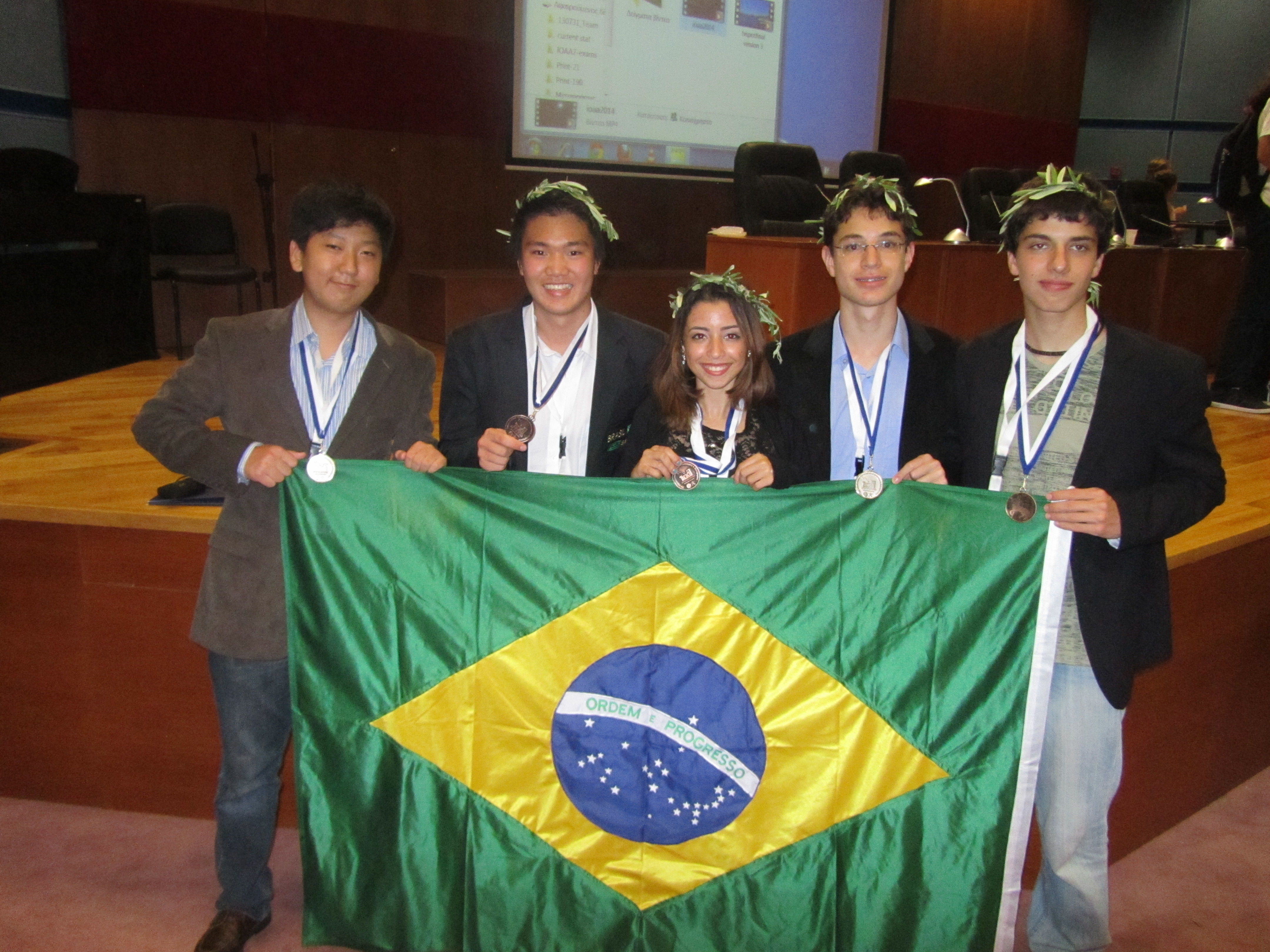 Equipe Brasileira na VII IOAA (Grécia, 21013)/